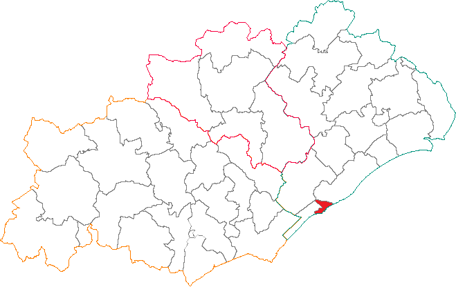 Situation du canton dans le département de l'Hérault.